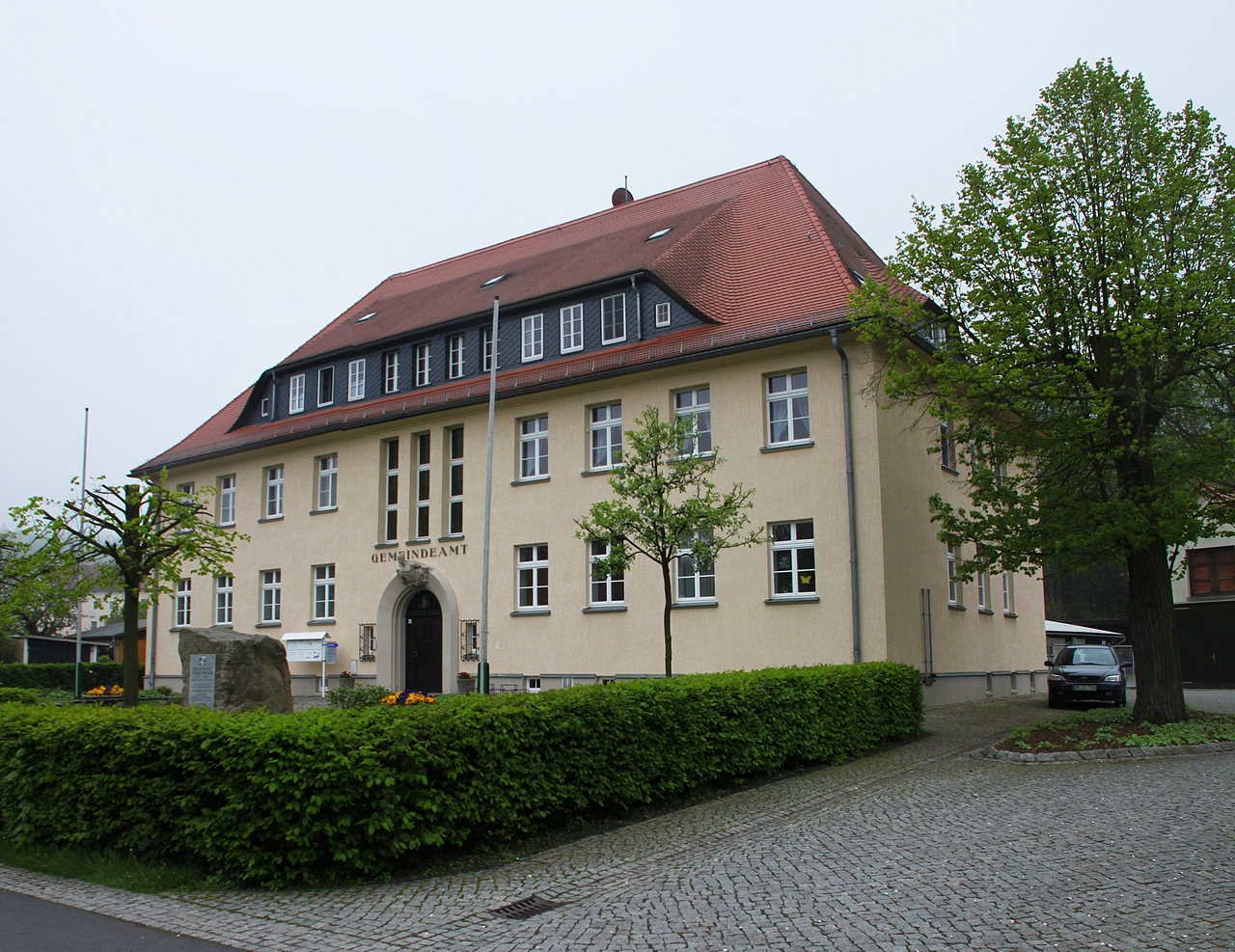 Hainewalde: Blick auf das 1926 erbaute Gemeindeamt (Kleine Seite 4, Denkmal-Nr. 09271021)